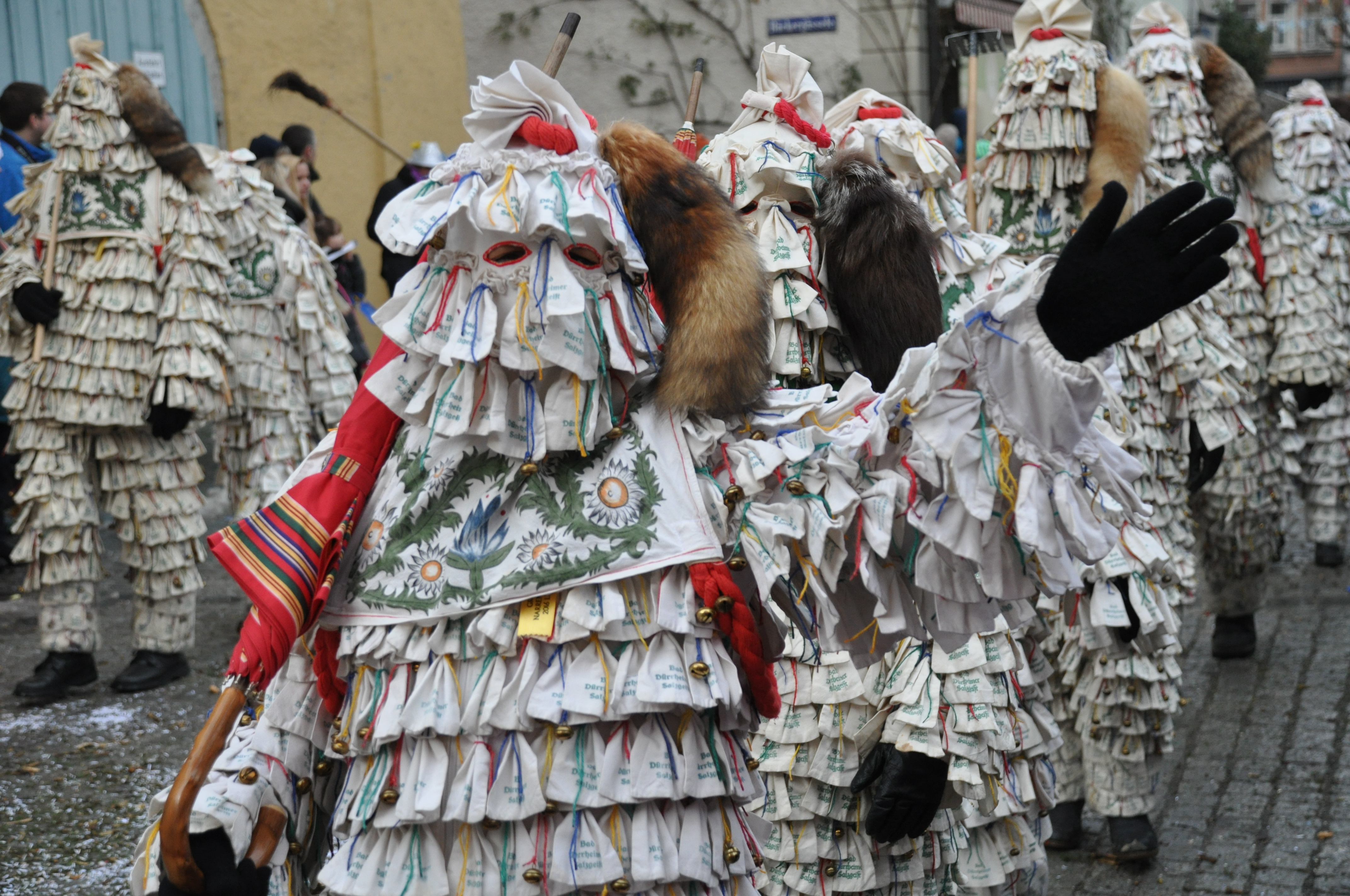 Narrenzunft Bad Dürrheim; Narrenfigur: Salzhansel Fotografiert beim Großen Narrentreffen der Vereinigung Schwäbisch-Alemannischer Narrenzünfte (VSAN) in Lindau; Narrensprung am Sonntag, 24. Januar 2016.